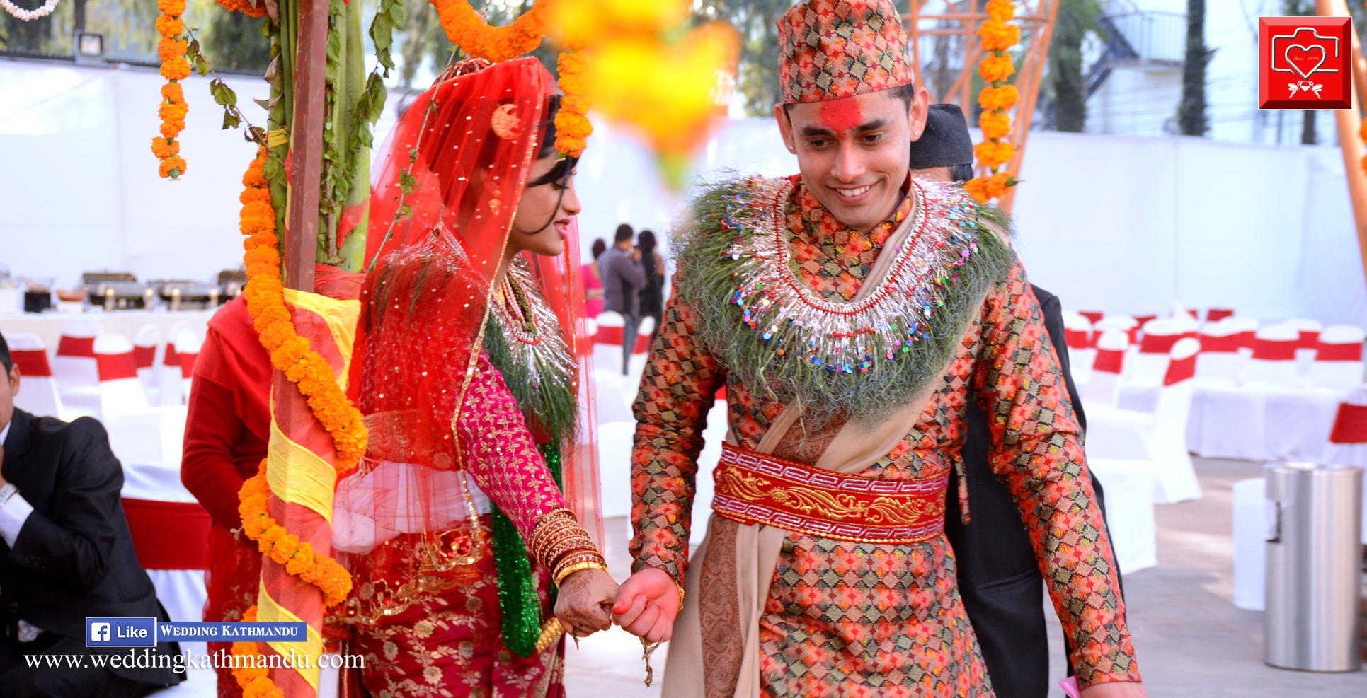 स्वयंवरःतिन गुण सत्व,रजाे र तमाे यी गुण लाइ सम्मान गर्न स्वयंवर गर्दा परिक्रमा गरिन्छ यि गुणहरूले युक्त ब्रमा, विष्णु र महेश्वरलाइ नै अाप्नाे पतिकाे स्वरूपमा हिन्दु नारीले देख्ने हुनाले स्वयंवर गर्दा करूवामा अाप,पिपल,दुबाे,रायाे,सर्सिउ दुवाे लिएर पानीकाे जलधारा लगाइ तिन चाेटी परिक्रमा गर्ने प्रचलन हिन्दु विवाहमा पाइन्छ ।w